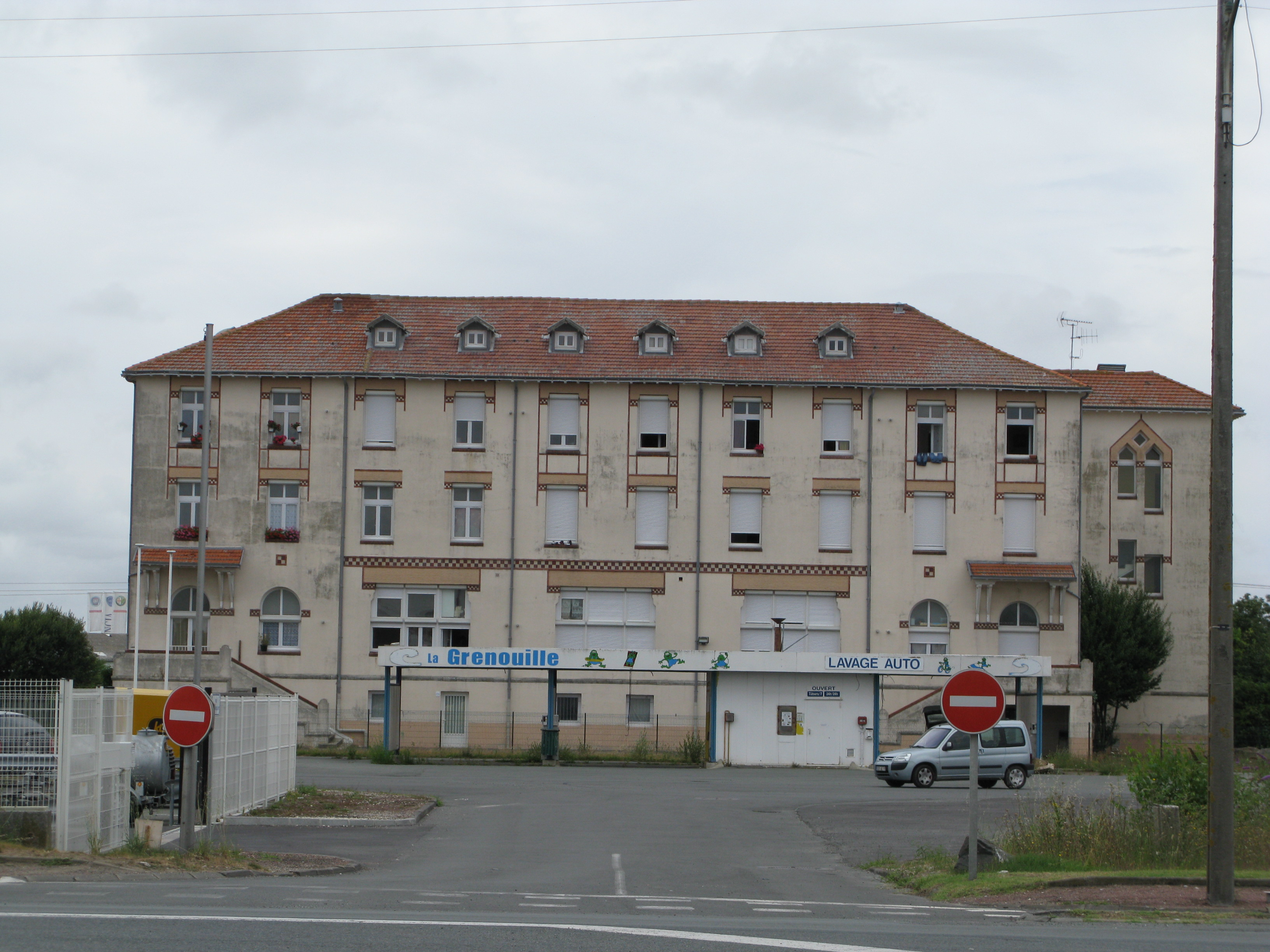 Bâtiment d'habitation à Tonnay-Charente, zone de la fraternité.